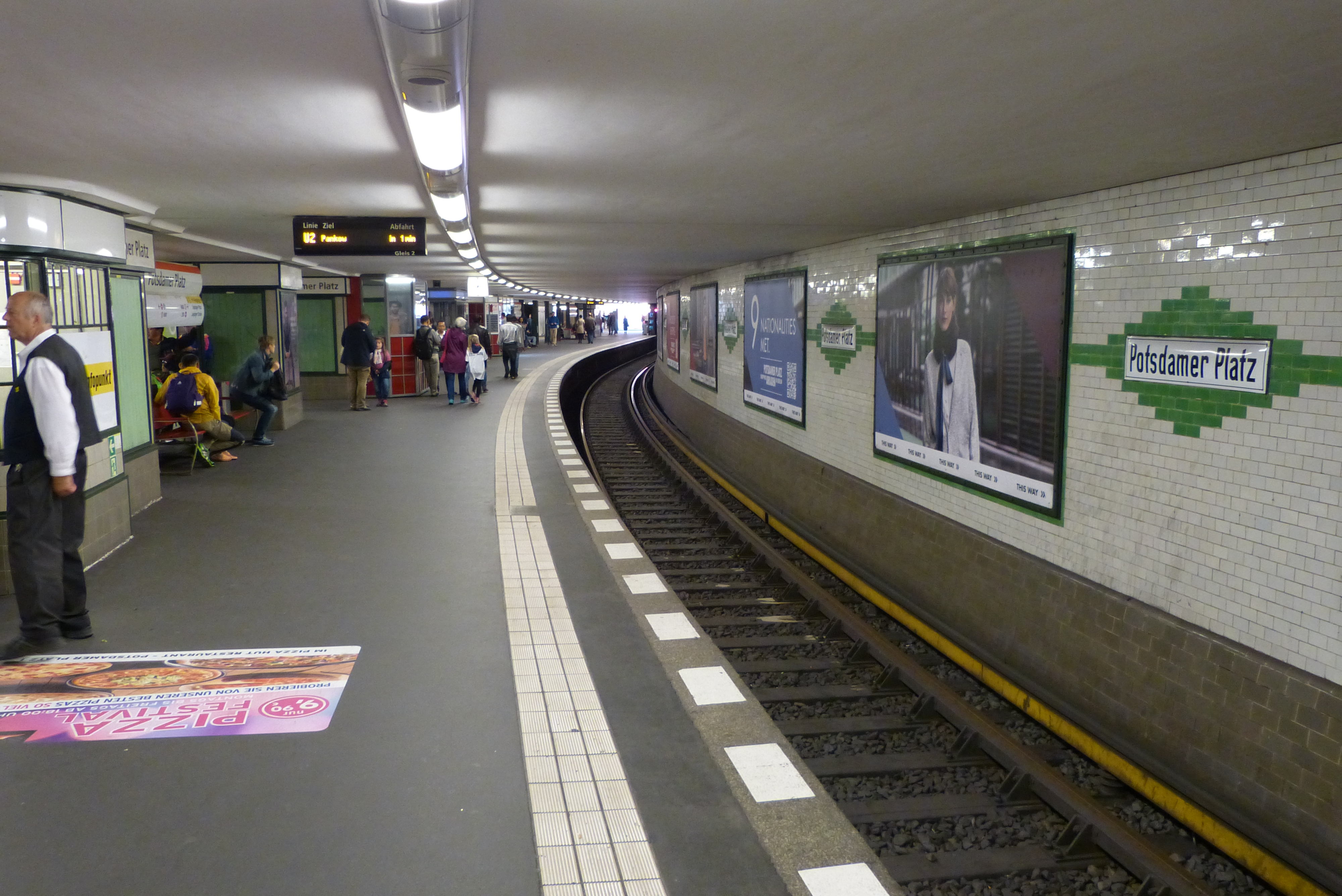 Berlin, U-Bahnhof Berlin Potsdamer Platz, Bahnsteig der U2, Blick Richtung Osten